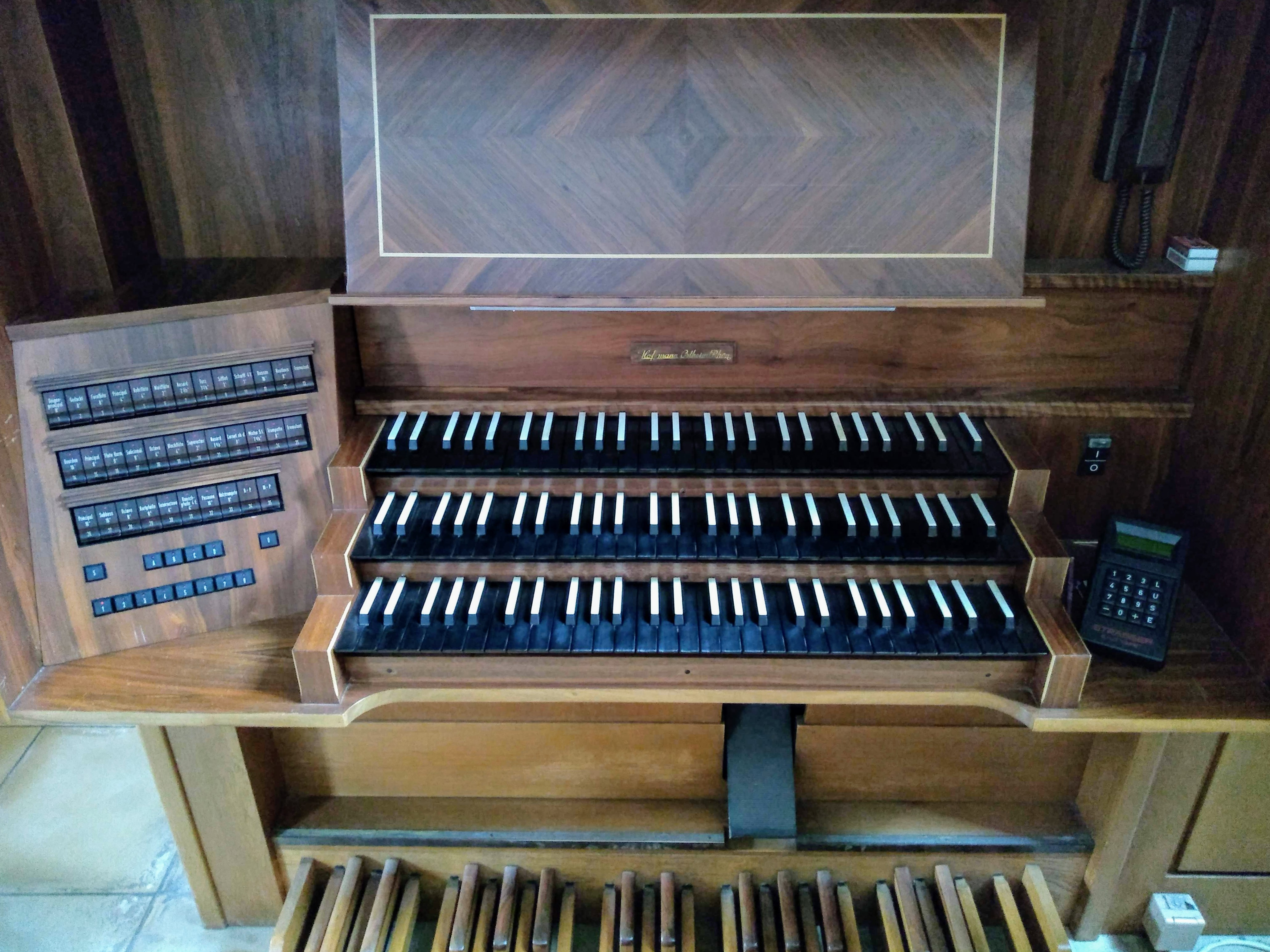 Spieltisch der Hofmann-Orgel in der Pfarrkirche St. Michael (Kürnach)